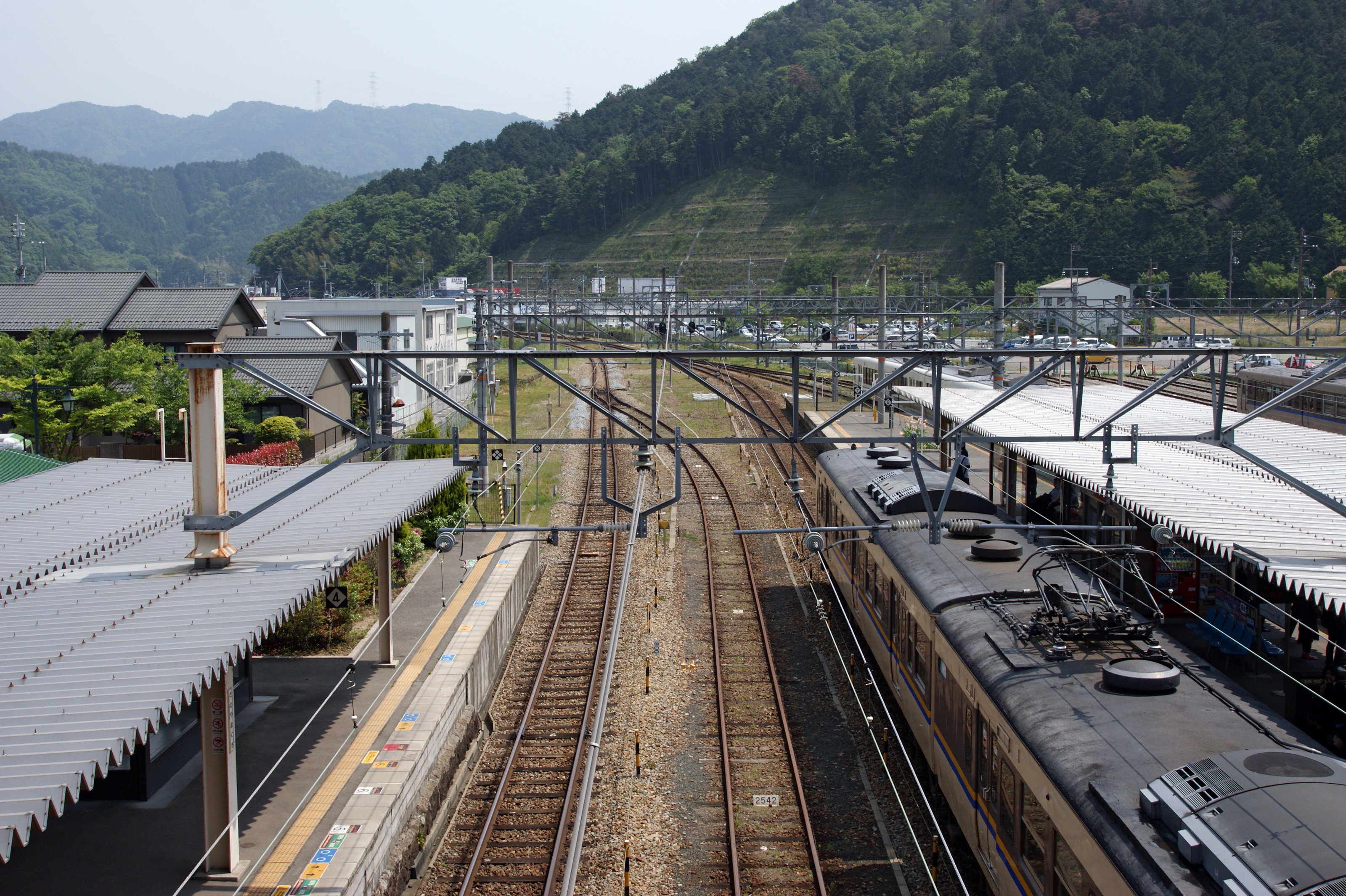 Sasayamaguchi Station in Sasayama, Hyogo prefecture, Japan